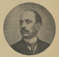 Eduardo Dato Iradier, en la revista La Ilustración Católica de España.